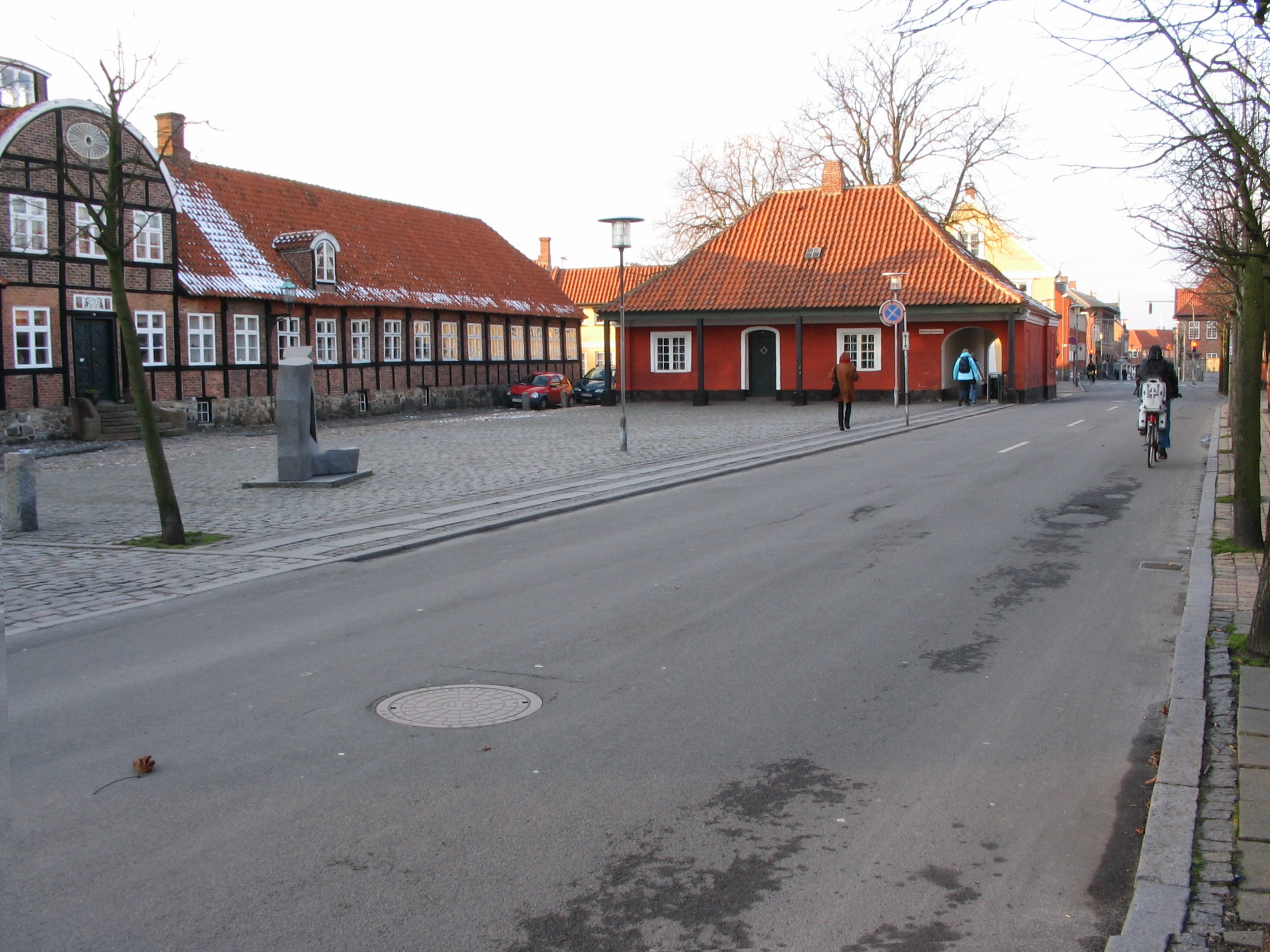 1743 A.D. Her hold Borgervæbningen til indtil midten af 1800-tallet.